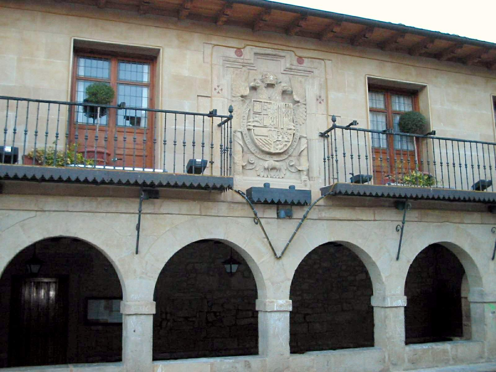 El Ayuntamiento de Elciego (Álava)